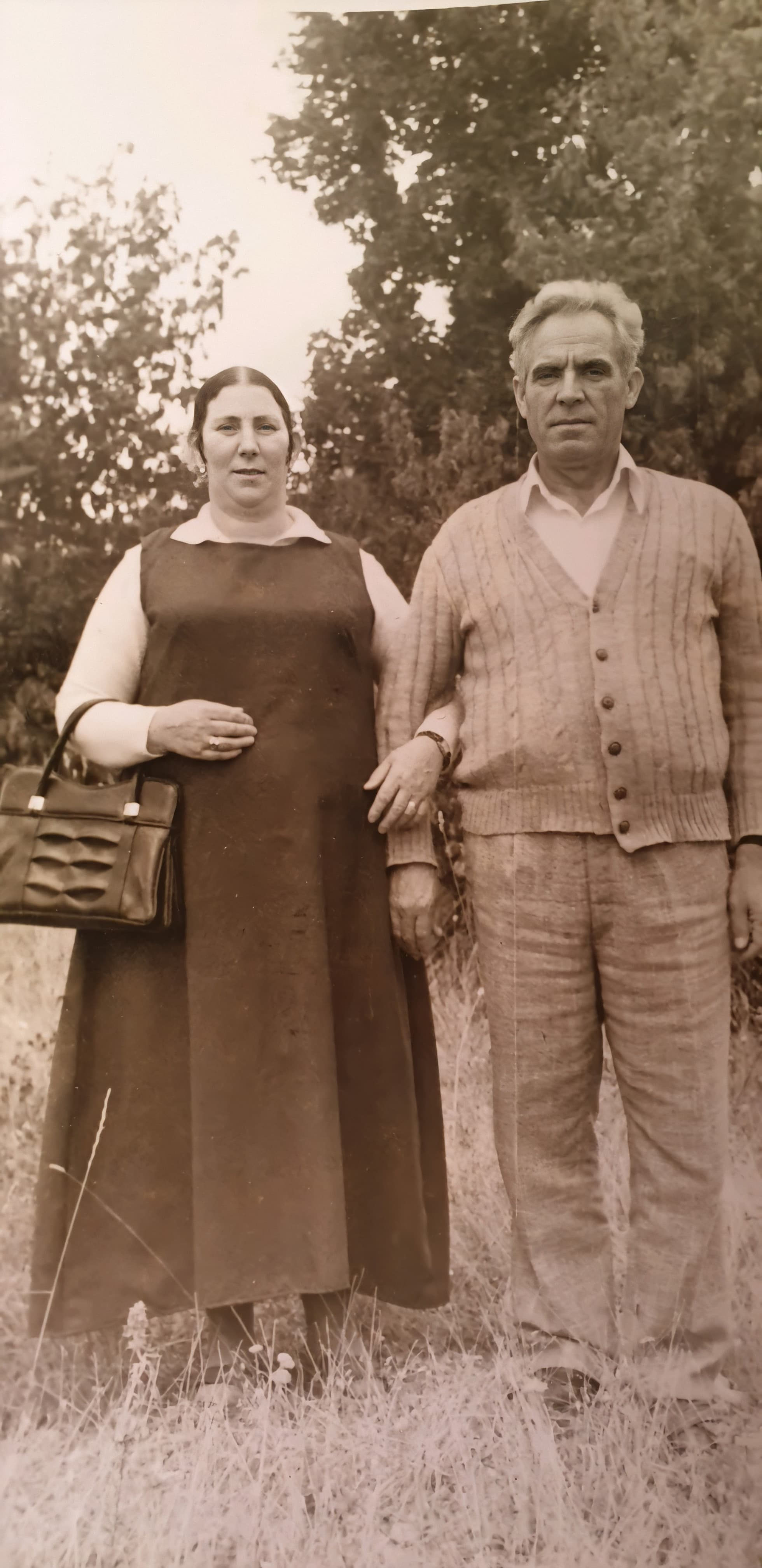 Osman Bilalli me bashkëshorten e tij Sabrije Bilalli